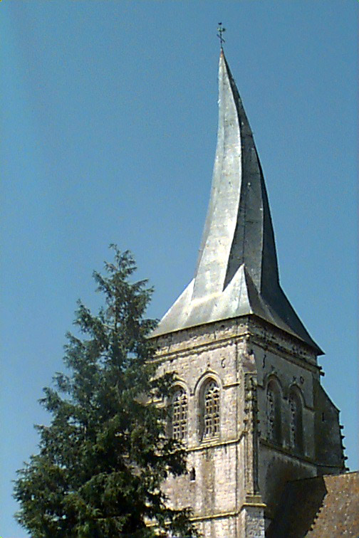 Verchin church